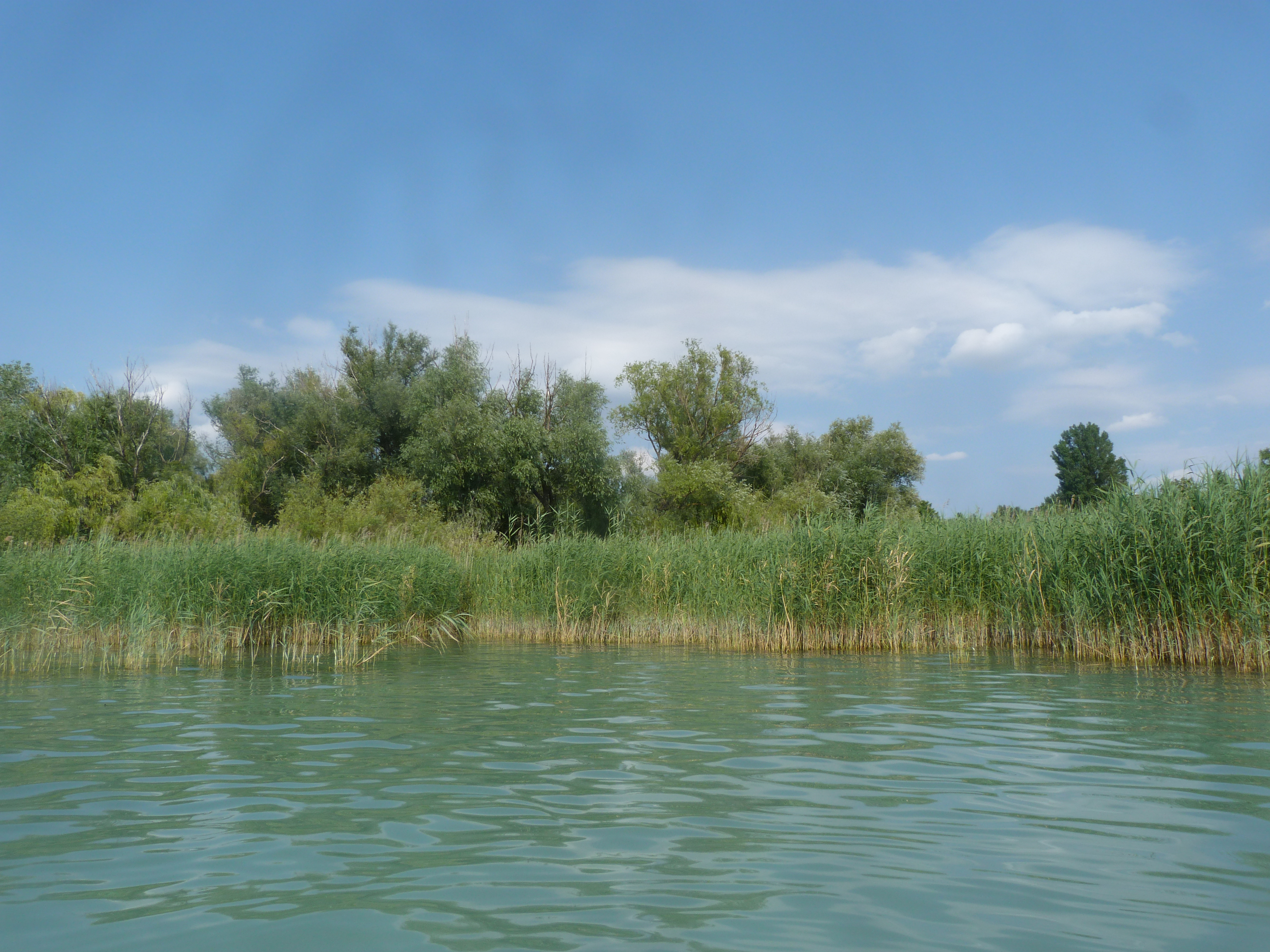 A felvétel 2015. július 16-án készült Alsóréten, Balatonkenesén. Nádas az Alsóréten. ©© Derzsi Elekes Andor, Budapest, 2015, A fénykép másolását és felhasználását a szerző ellenérték nélkül megengedi. Az engedély kiterjed a kereskedelmi célú hasznosításra is. Kéri azonban nevének feltüntetését a felhasználás során. A Metapolisz sorozat valamennyi képe és filmje Creative Commons alatti. kereskedelmi - for profit - célra is felhasználható. Ajánlott hivatkozás: Derzsi Elekes Andor: Metapolisz DVD line